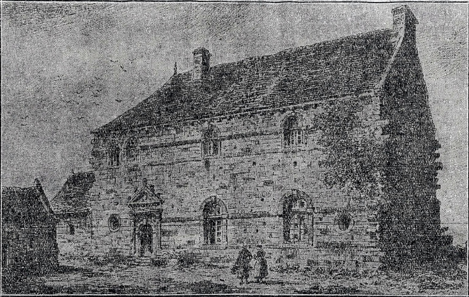 Le manoir de Tremenec en Plovan dessiné par Louis Le Guennec